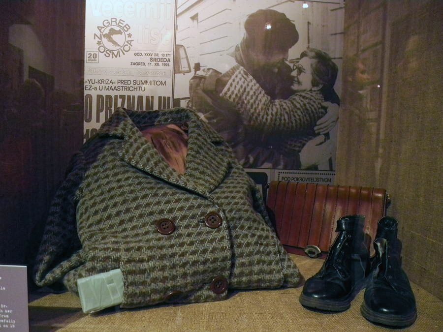 Izložba Domovinski rat u Hrvatskom povijesnom muzeju tijekom Noći muzeja.